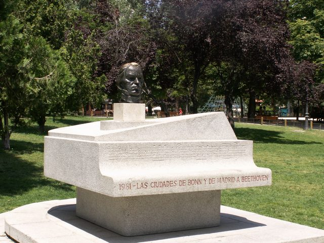 Parque de Berlín. Monumento a Beethoven.